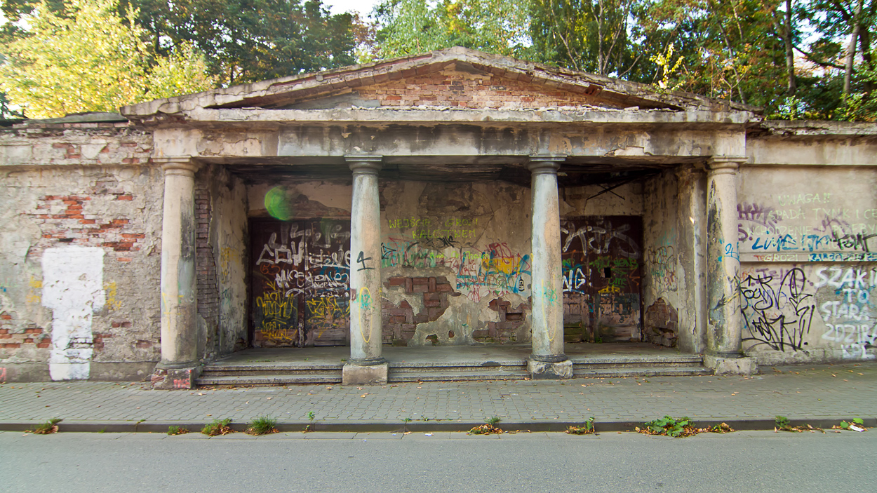 Cmentarz żydowski w Katowicach - nagrobki